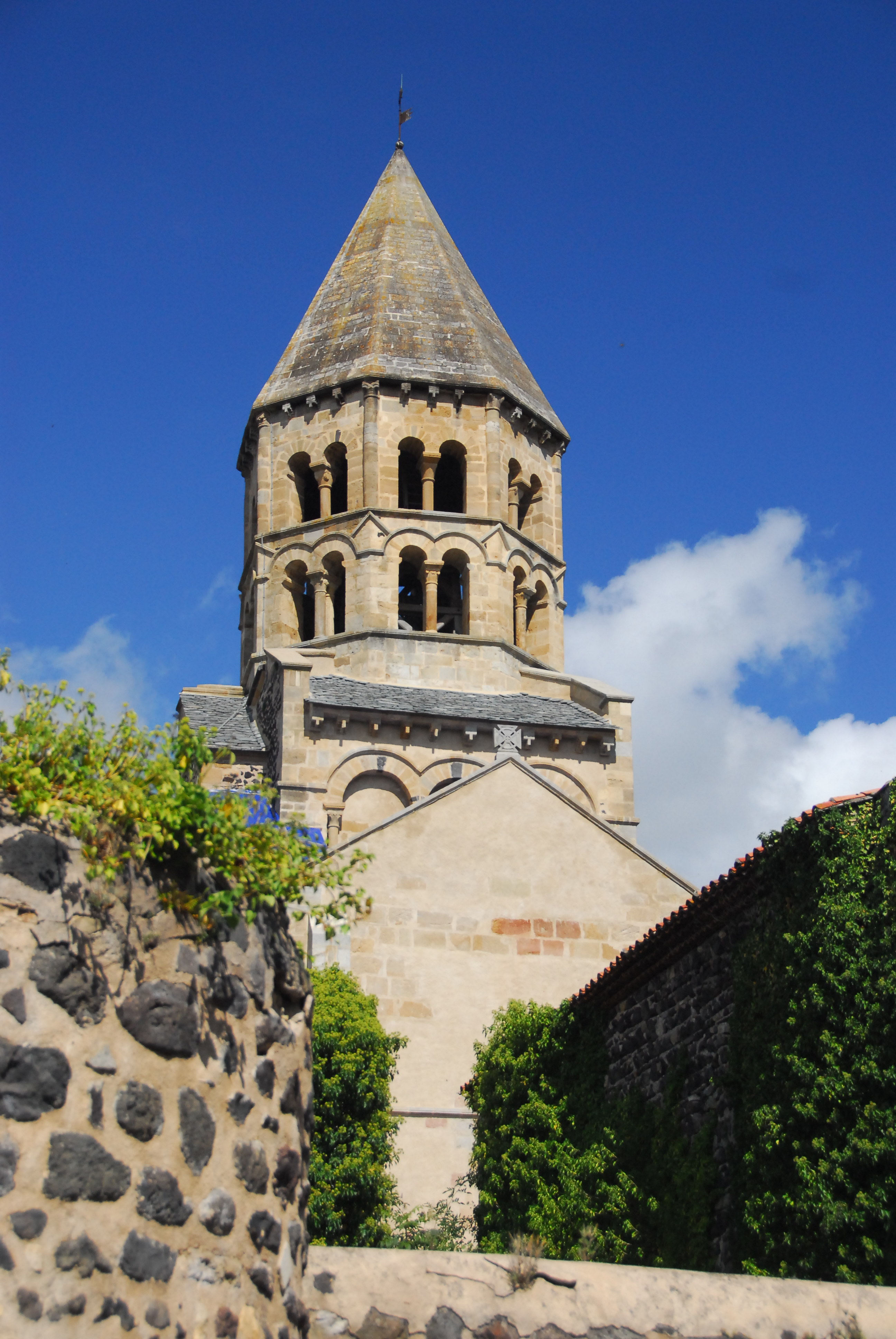 St-Saturnin (Puy-de-Dôme), Vierungdturm von S